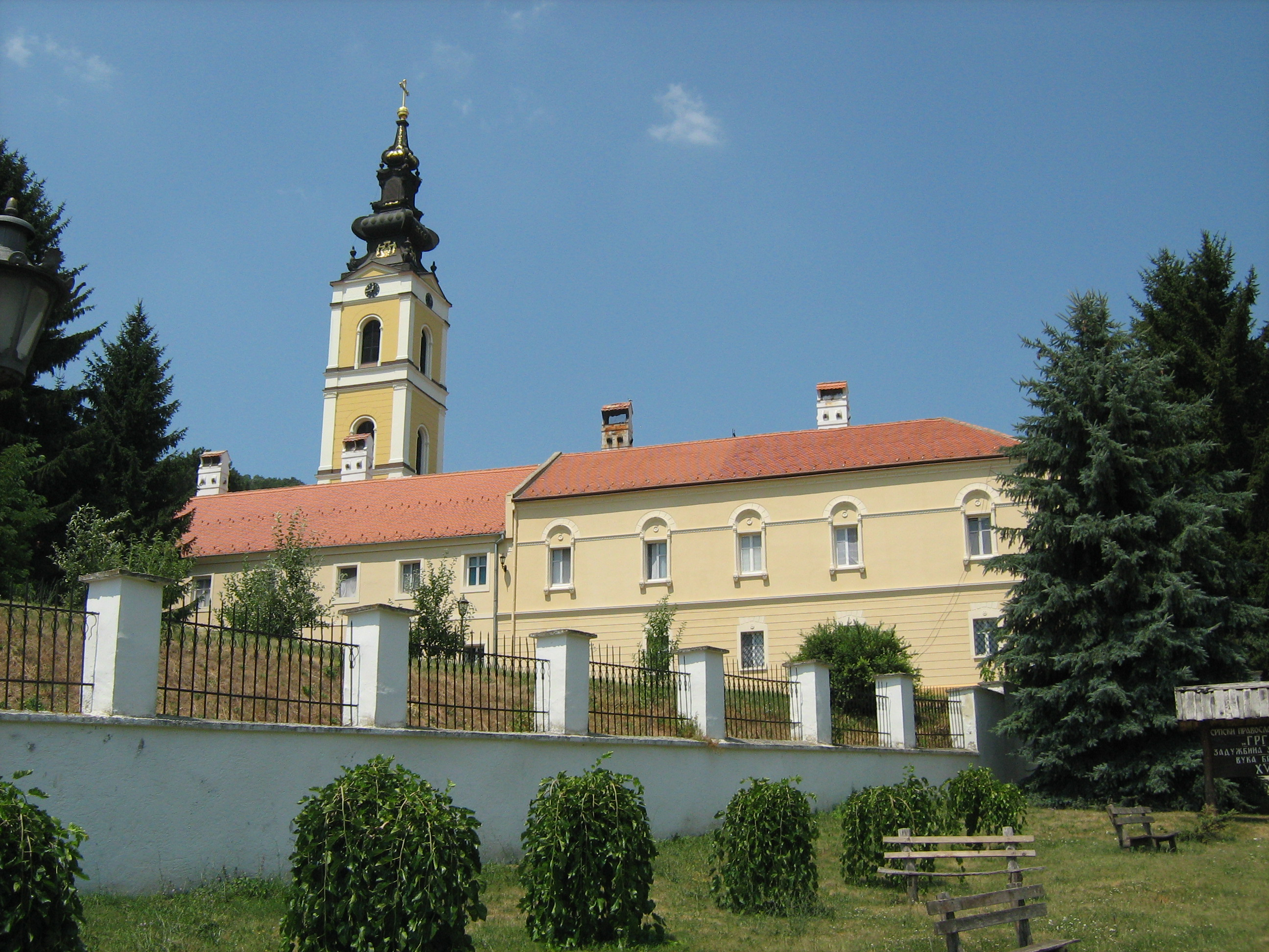 Манастир Гргетег